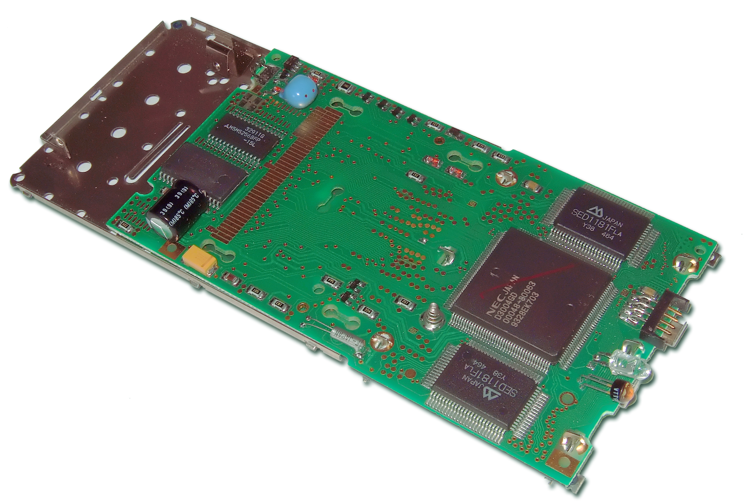 Die Hauptplatine eines Hewlet Packard HP 48G